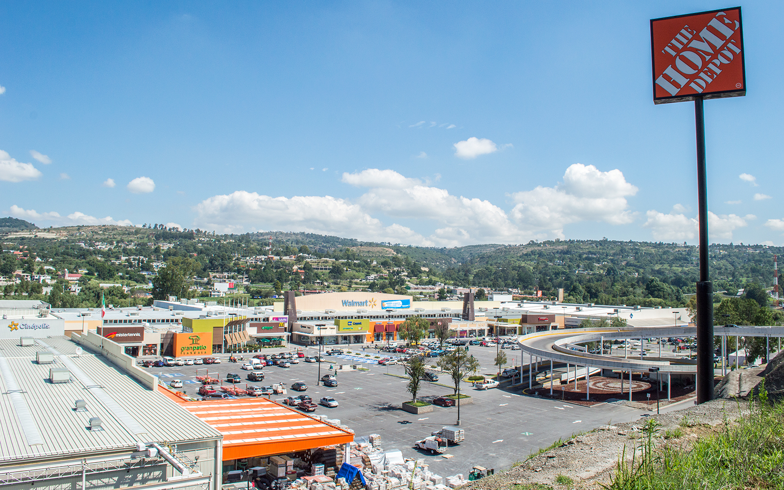 Centro Comercial - Ciudad de Tlaxcala